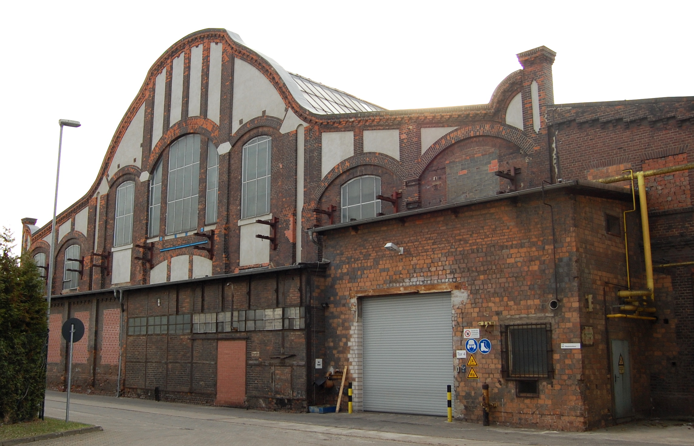 Gießereihalle auf dem SKL-Gelände in Salbke